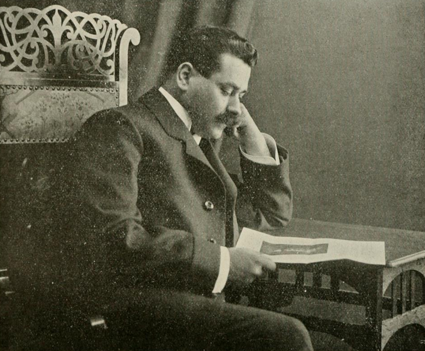 Hornjoserbsce: Portret Franca Krala (1886–1915); wučer w Kamjencu, podwyšk w sakskim wójsku, serbski spisowaćel a redaktor.